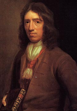 Капитан Вильям Дэмпир, пирaт и гидрограф